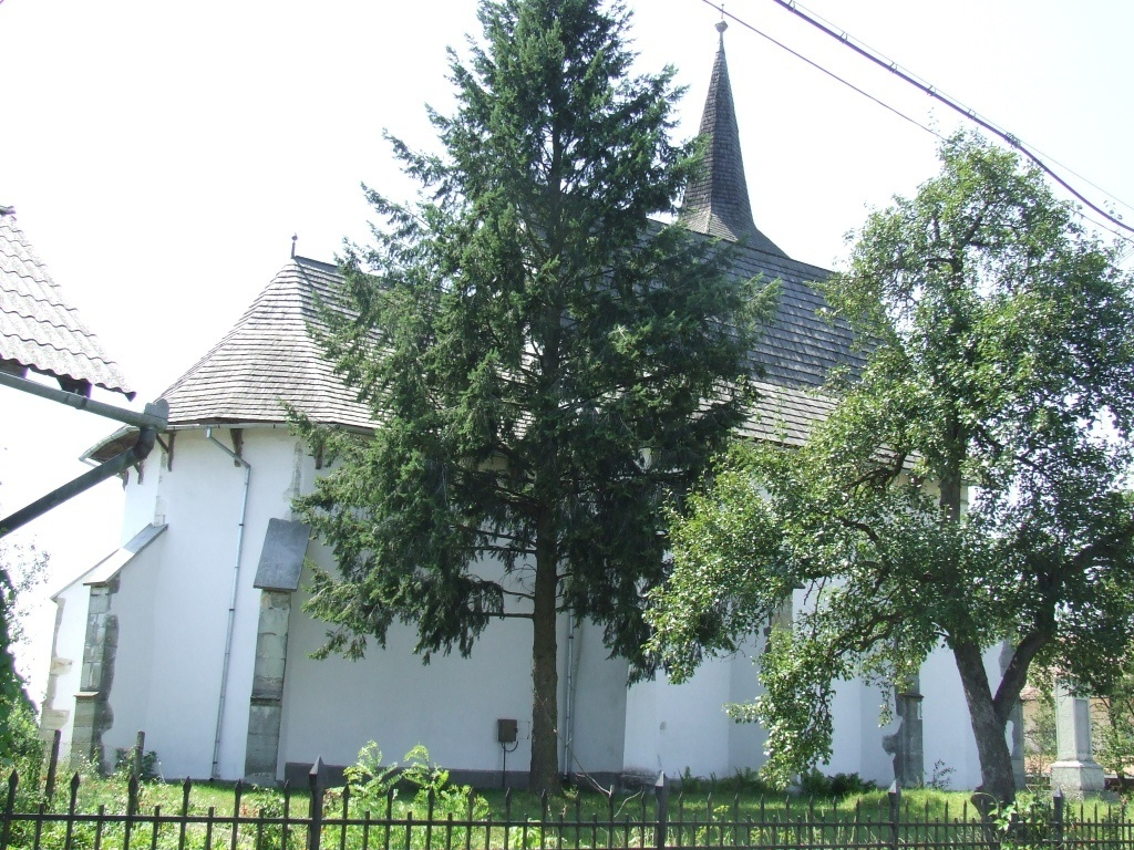 Church in Şintereag, Bistriţa-Năsăud County, Romania